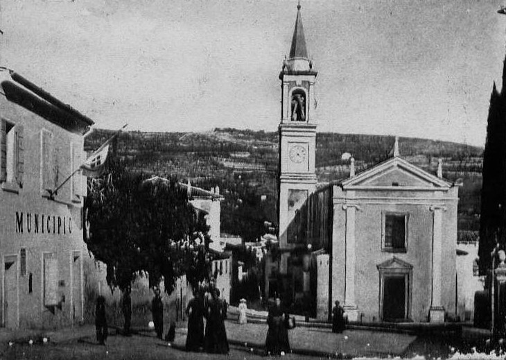 Fotografia d'epoca della chiesa Parrocchiale di Fumane (provincia di Verona)